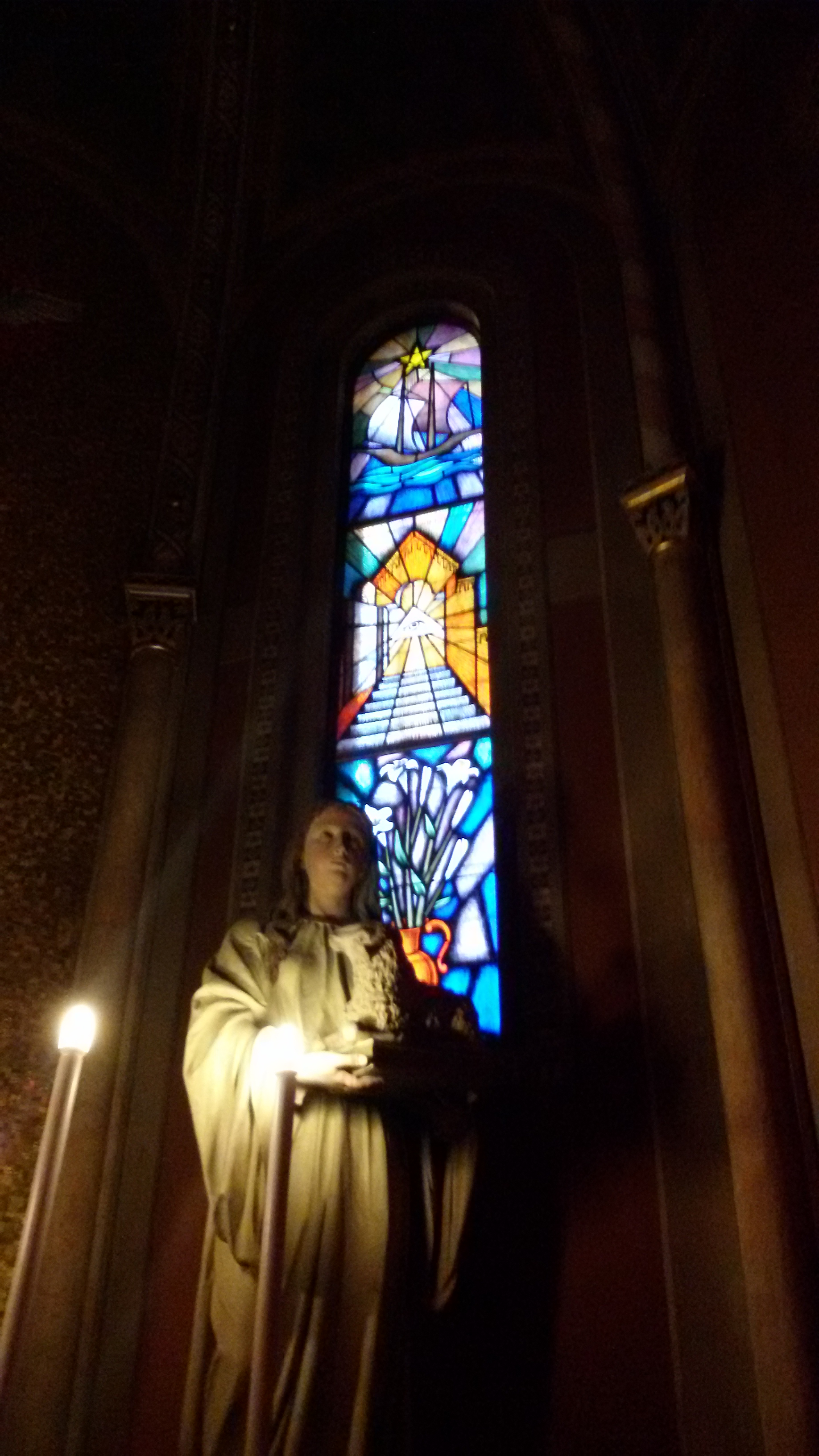 Chiesa di Santa Cristina Quinto di Treviso